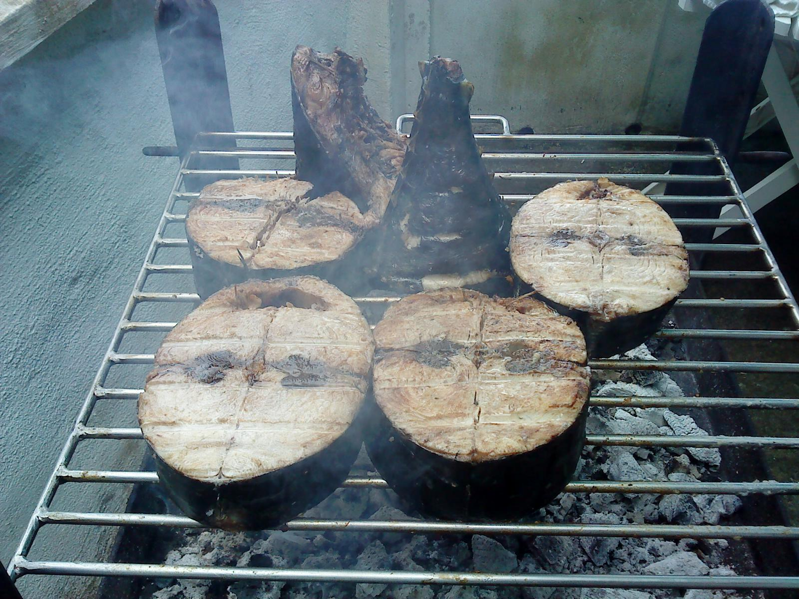 Preparación de bonito asado a la parrilla (ojael) en Ondarroa Bizkaia País Vasco (España).